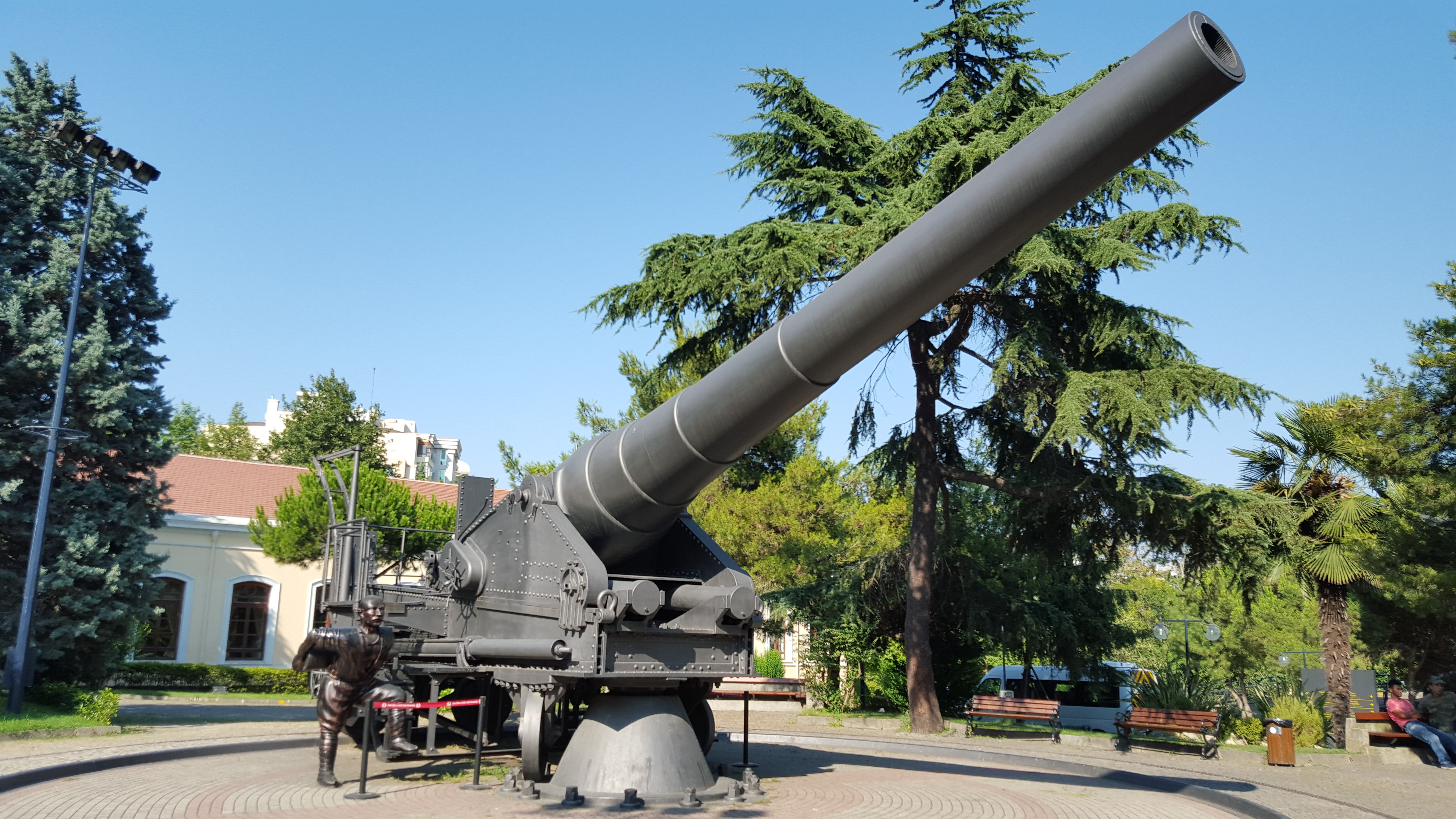 תותח גרמני מבית היוצר של קרופ אשר שימש במהלך מלחמת העולם השנייה את הצבא העות'מאני בביצורי חזית גליפולי. מוצג במוזיאון הצבאי באיסטנבול Askeri Müzesi (Military Museum) in Şişli, İstanbul, Turkey. The gun is a 335 mm L/35 built in 1889 on a coast defense mount.